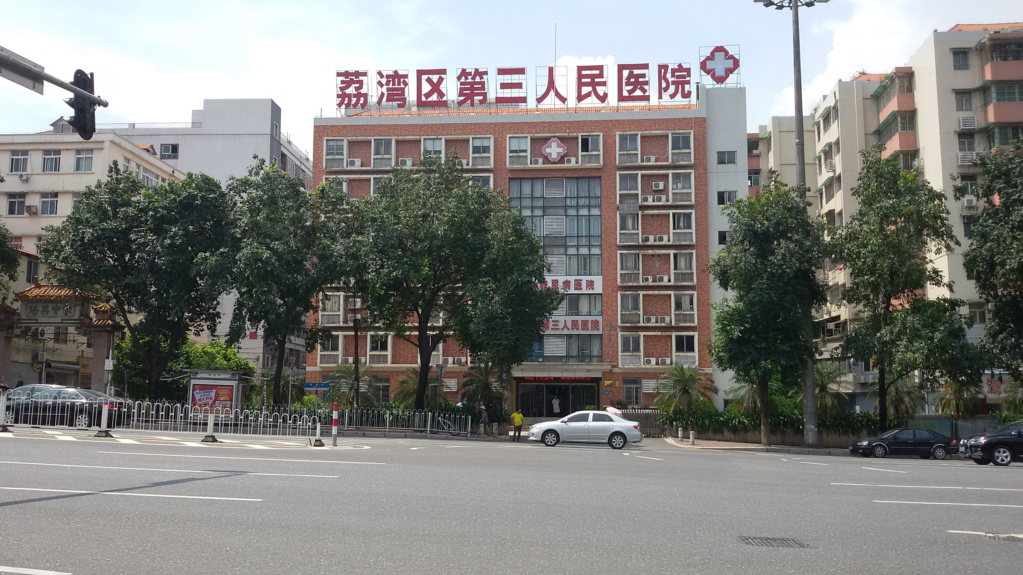 粵語: 荔灣區第三人民醫院